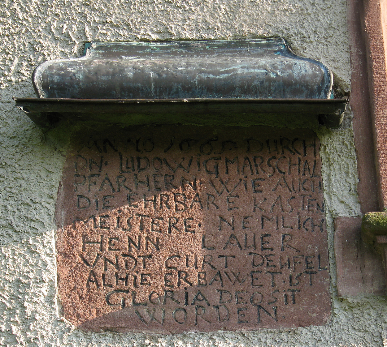 Church of Kleinseelheim (deatil)